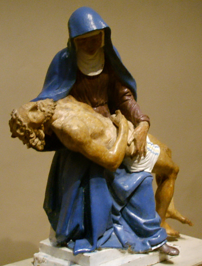 National gallery in washington d.c., giovanni della robbia, pietà, 1510-1520